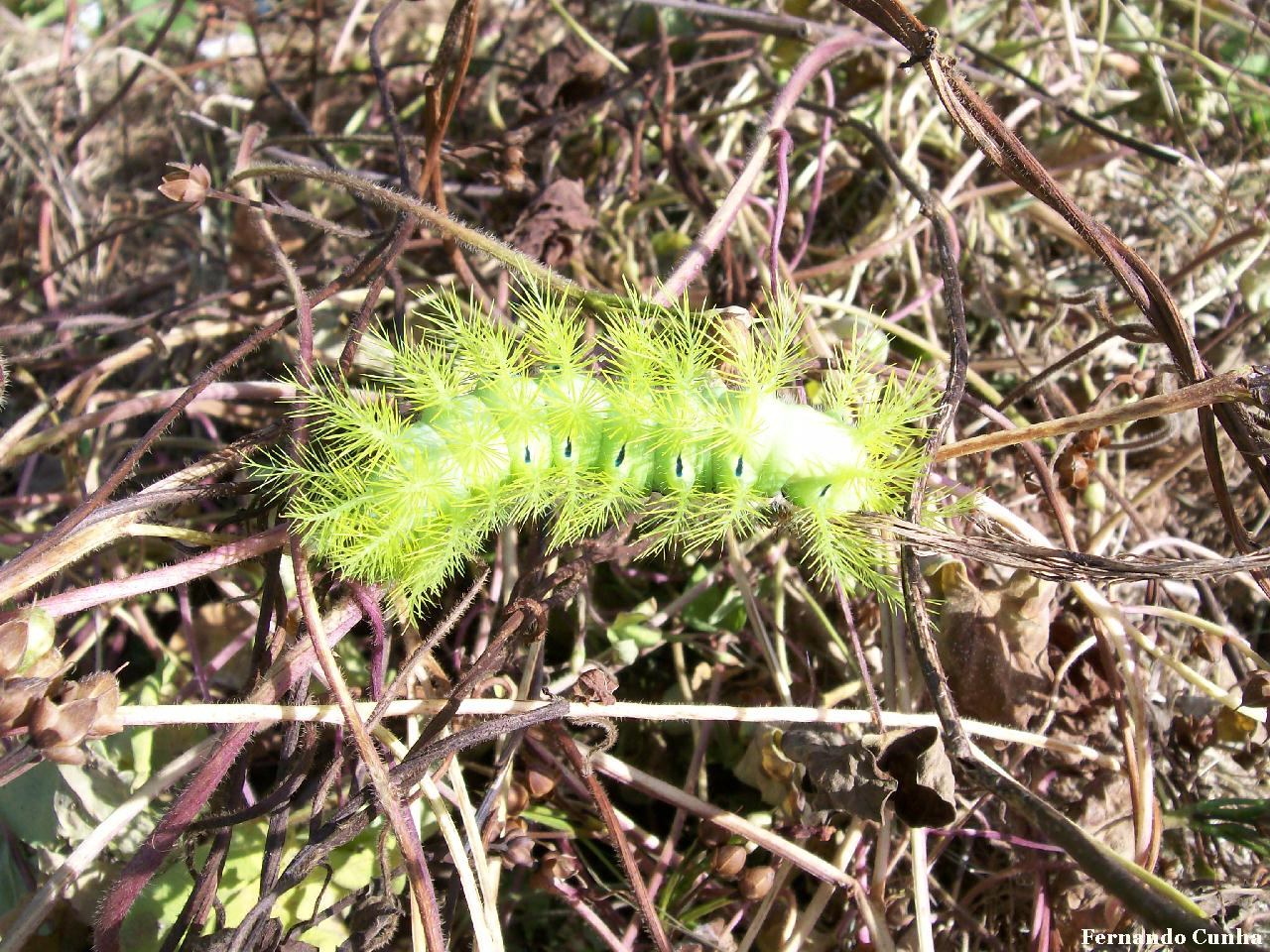 Lagarta